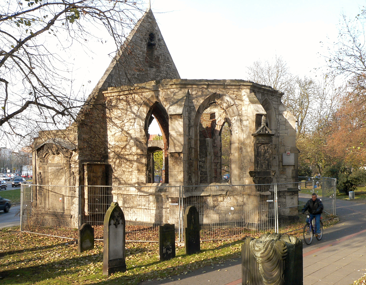 Ruine der Nikolaikapelle in Hannover Foto aufgenommen von Benutzer Axel Hindemith, Dezember 2005